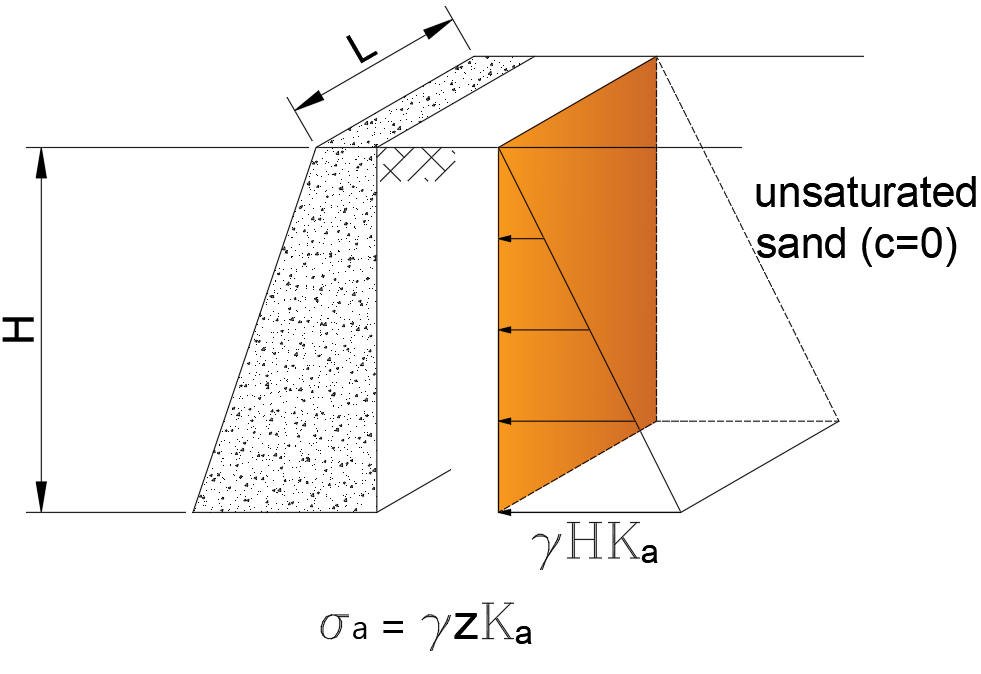 비포화 모래지반 토압분포